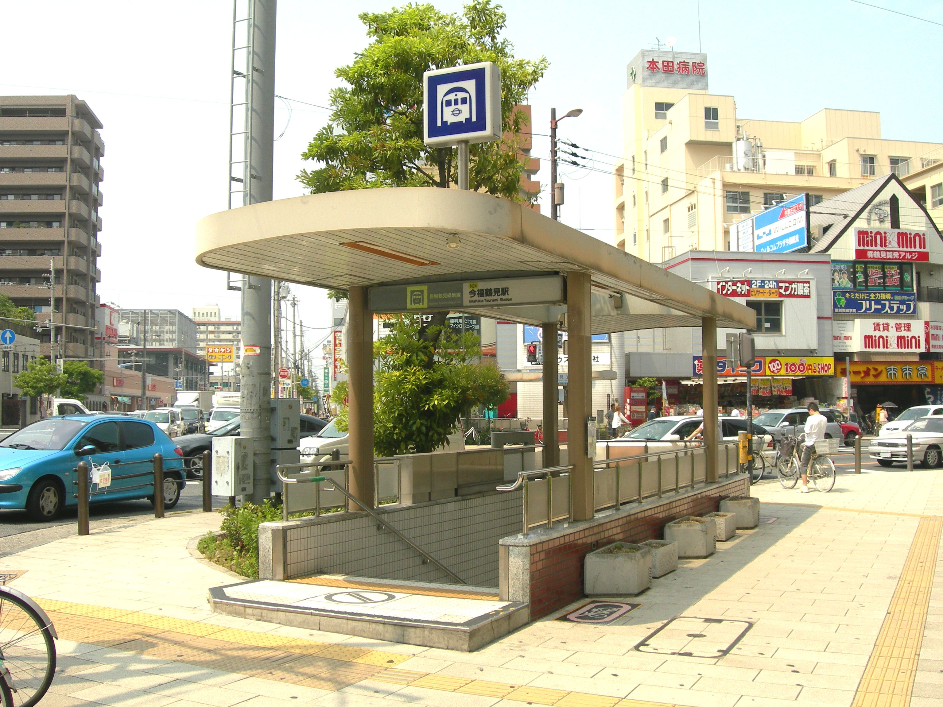 大阪市営地下鉄今福鶴見駅